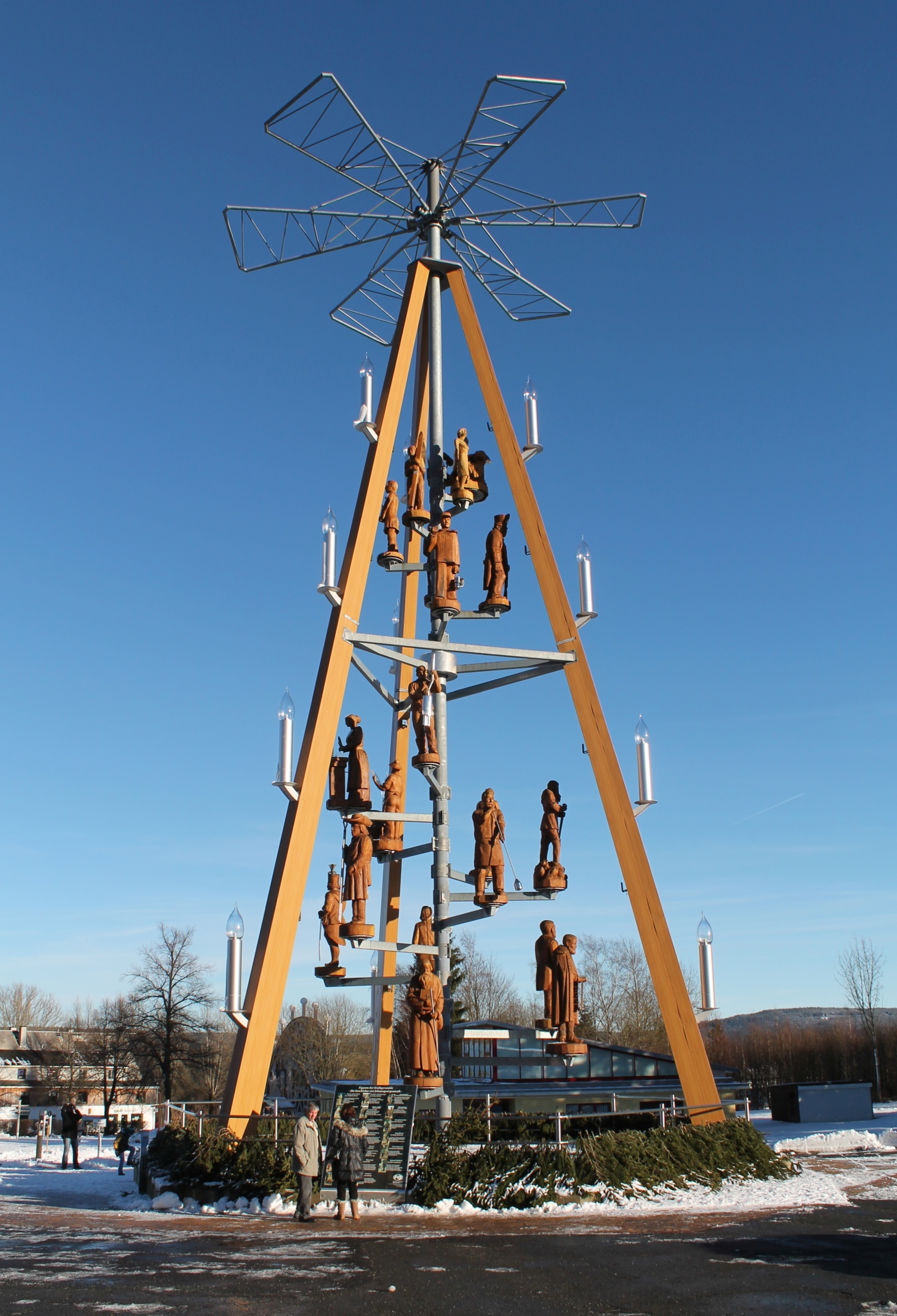 Großpyramide Johangeorgenstadt im Winter